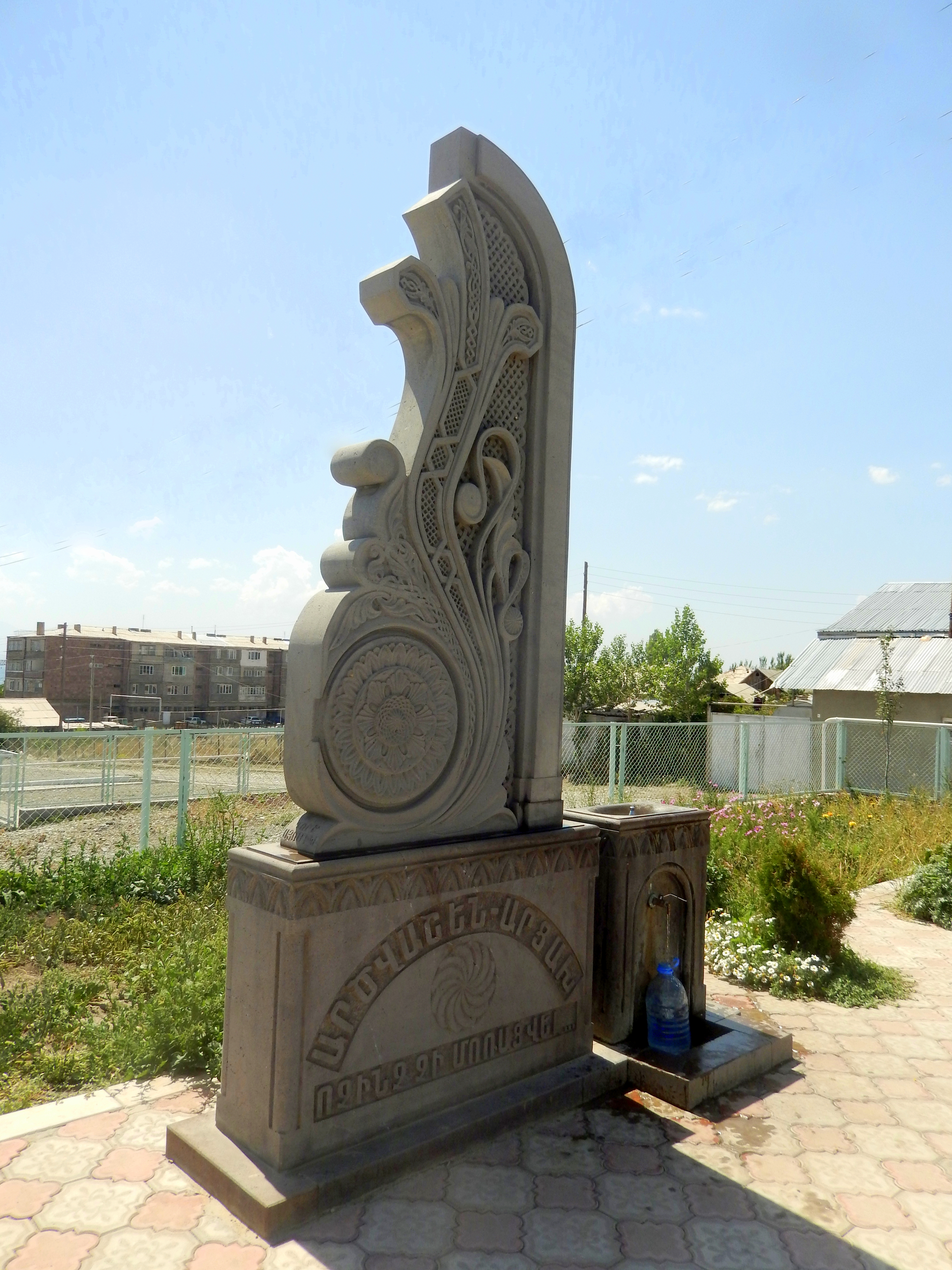 Շորժա, հուշարձան, նվիրված Արցածյան պատերազմին